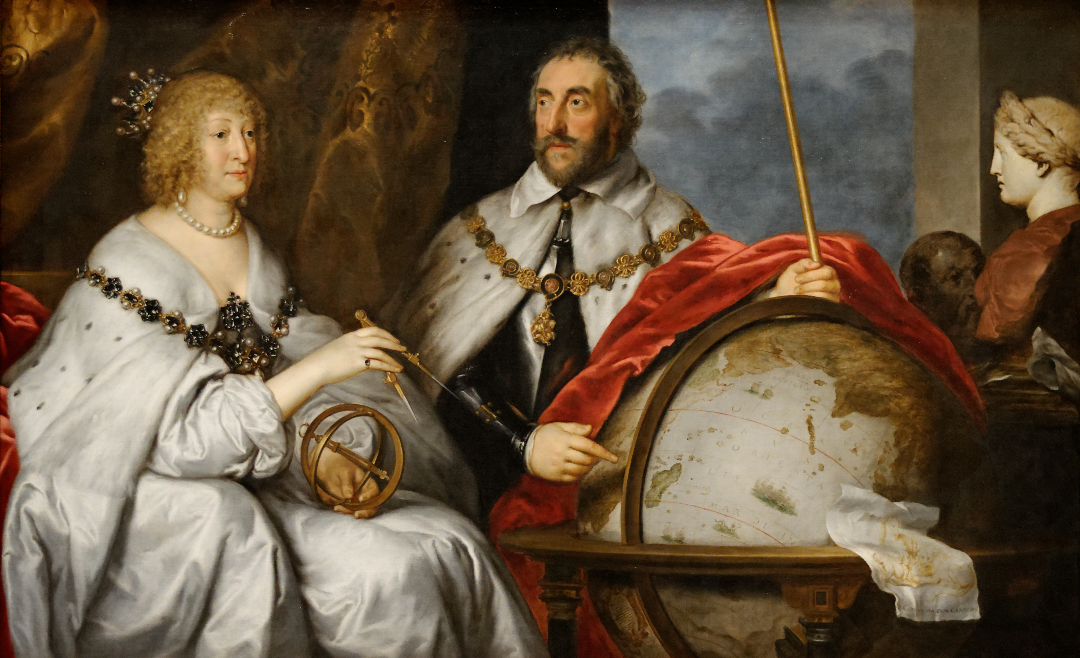 Thomas Howard comte d'Arundel et sa femme Alathea Talbot dit le "Portrait Madagascar". Antoine van Dyck, vers 1639/1640. Exposé au au Kunsthistorisches Museum, Vienne (Autriche)